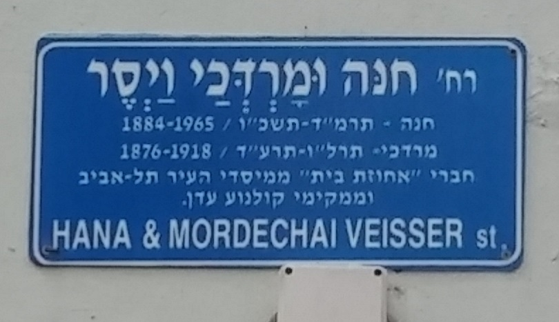 רחוב חנה ומרדכי וייסר בתל אביב